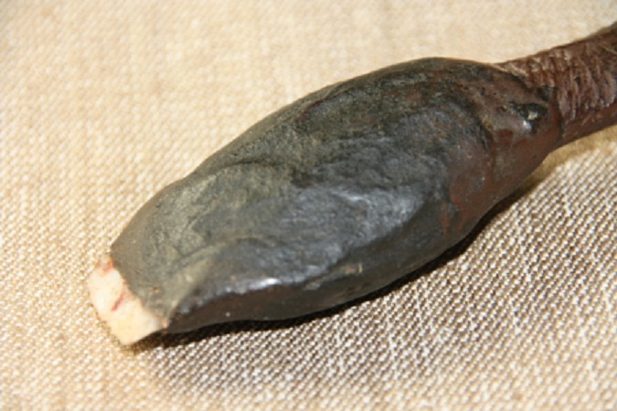 Manche de woomera avec une pierre coupante pour inciser